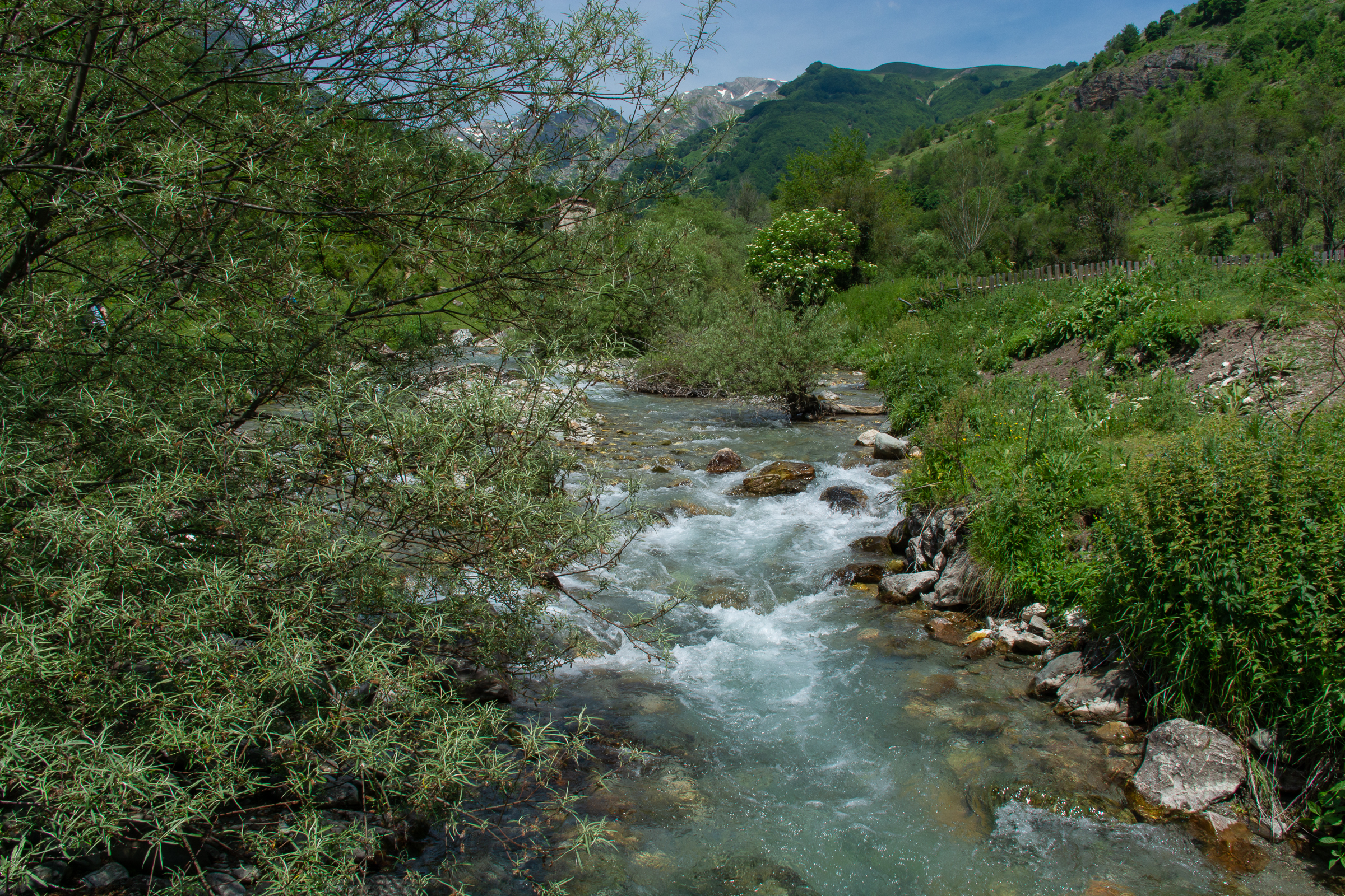 Длабока Река кај Жужње, Реканско.